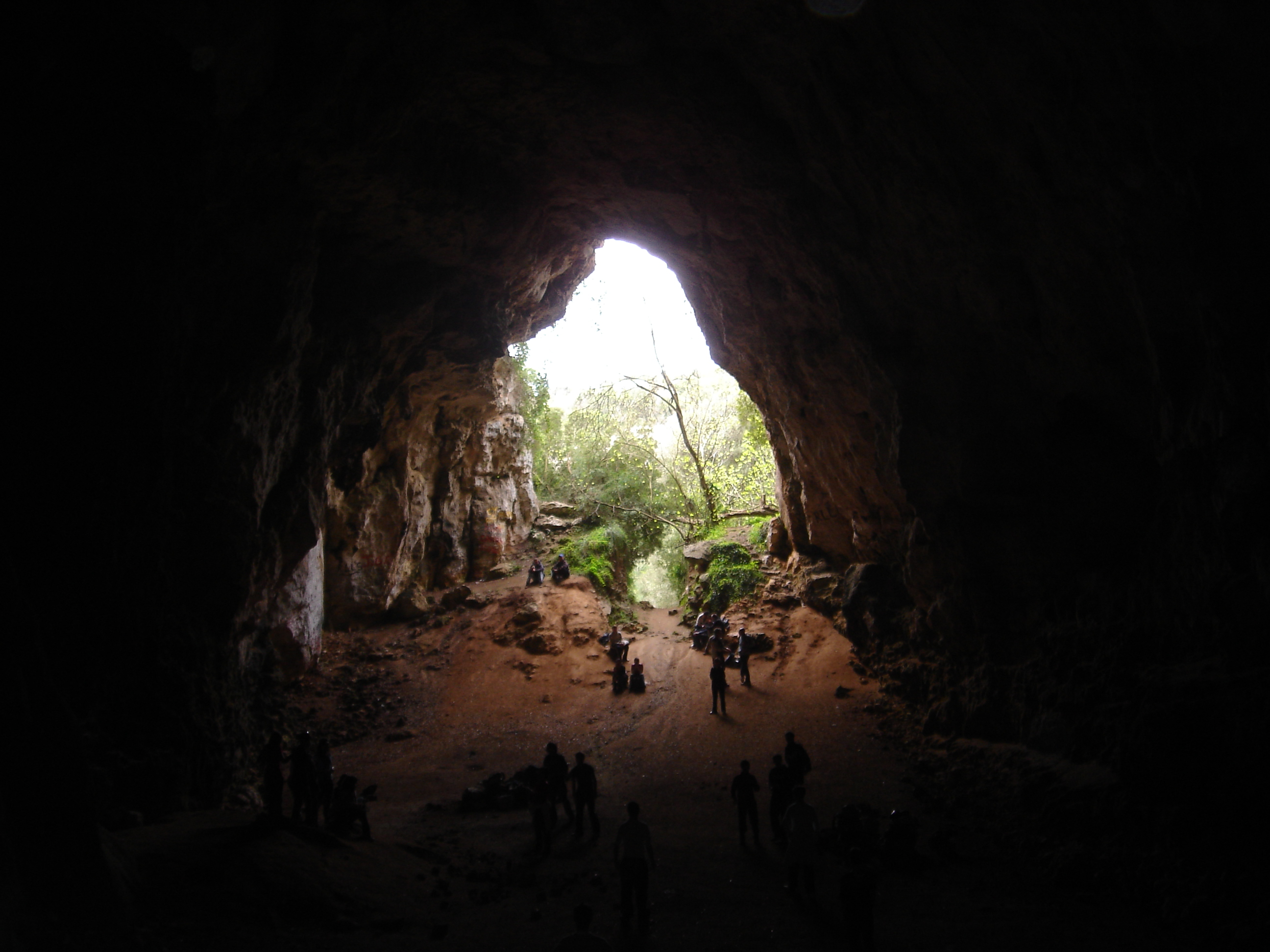 Cova situada a l'illa de Menorca, al municipi des Migjorn, al penya-segat del barranc de Binigaus.